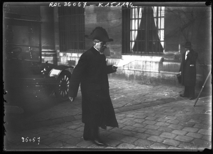 22-1-14, arrivée de Mr Bourget, académicien lors de la réception d'Emile Boutroux : photographie de presse​ [Agence Rol] dans le domaine public comme le fichier originel le précise